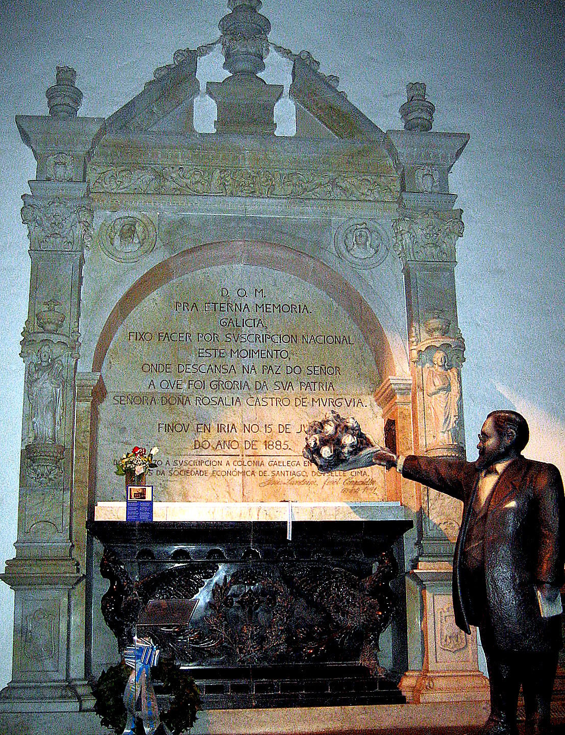 La tumba de Rosalía de Castro en el convento de Santo Domingo de Bonaval, Santiago de Compostela